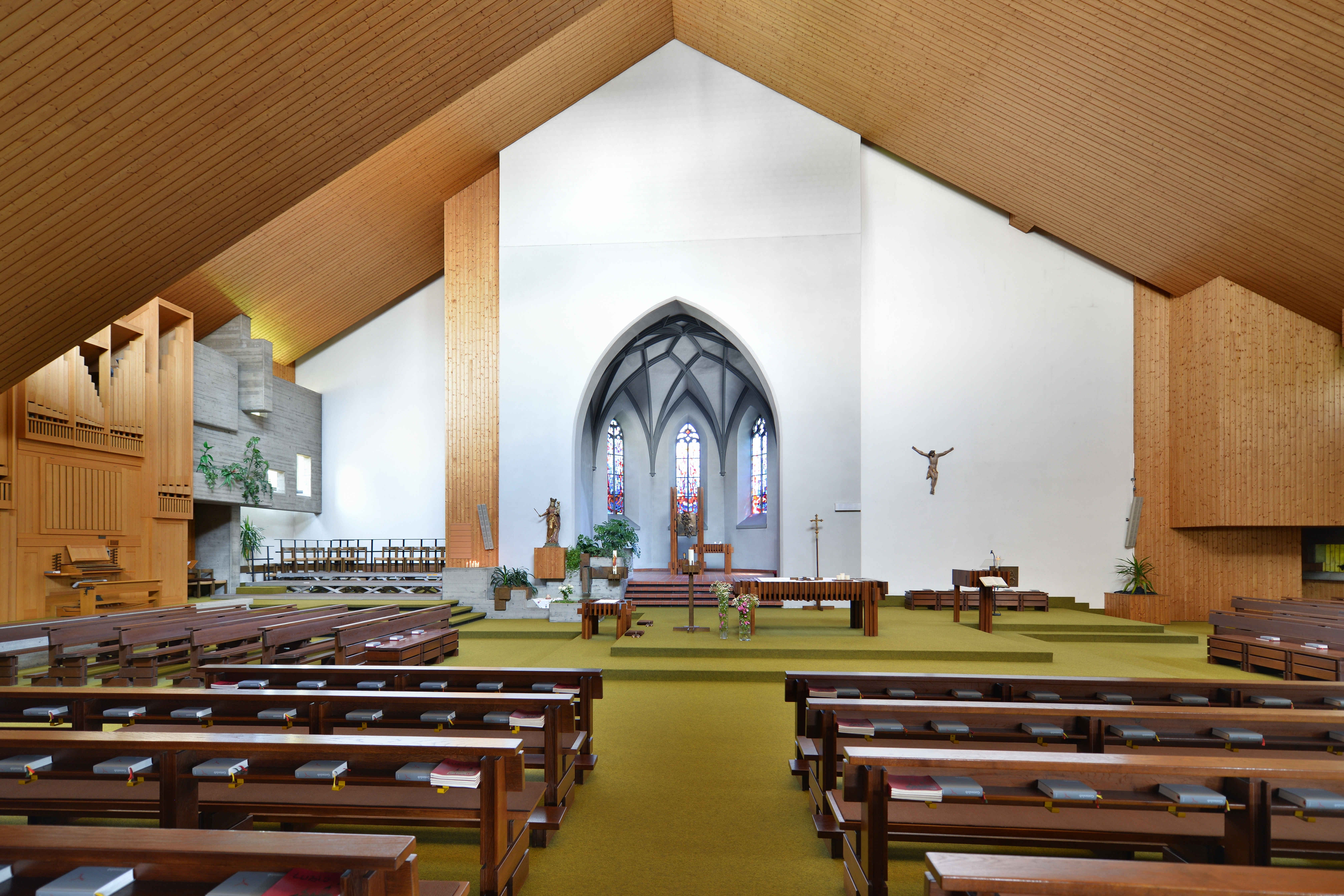 Pfarrkirche hl. Luzius, in Göfis bei Feldkirch in Vorarlberg.